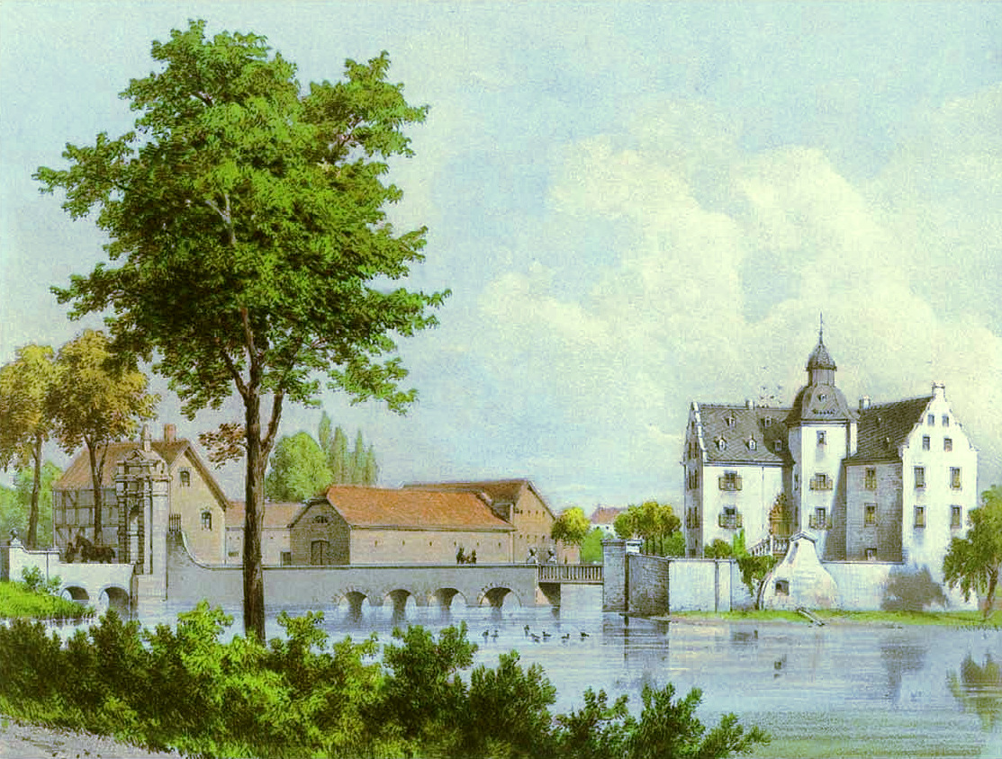 Wasserburg Metternich, Kreis Euskirchen, Rhein-Provinz